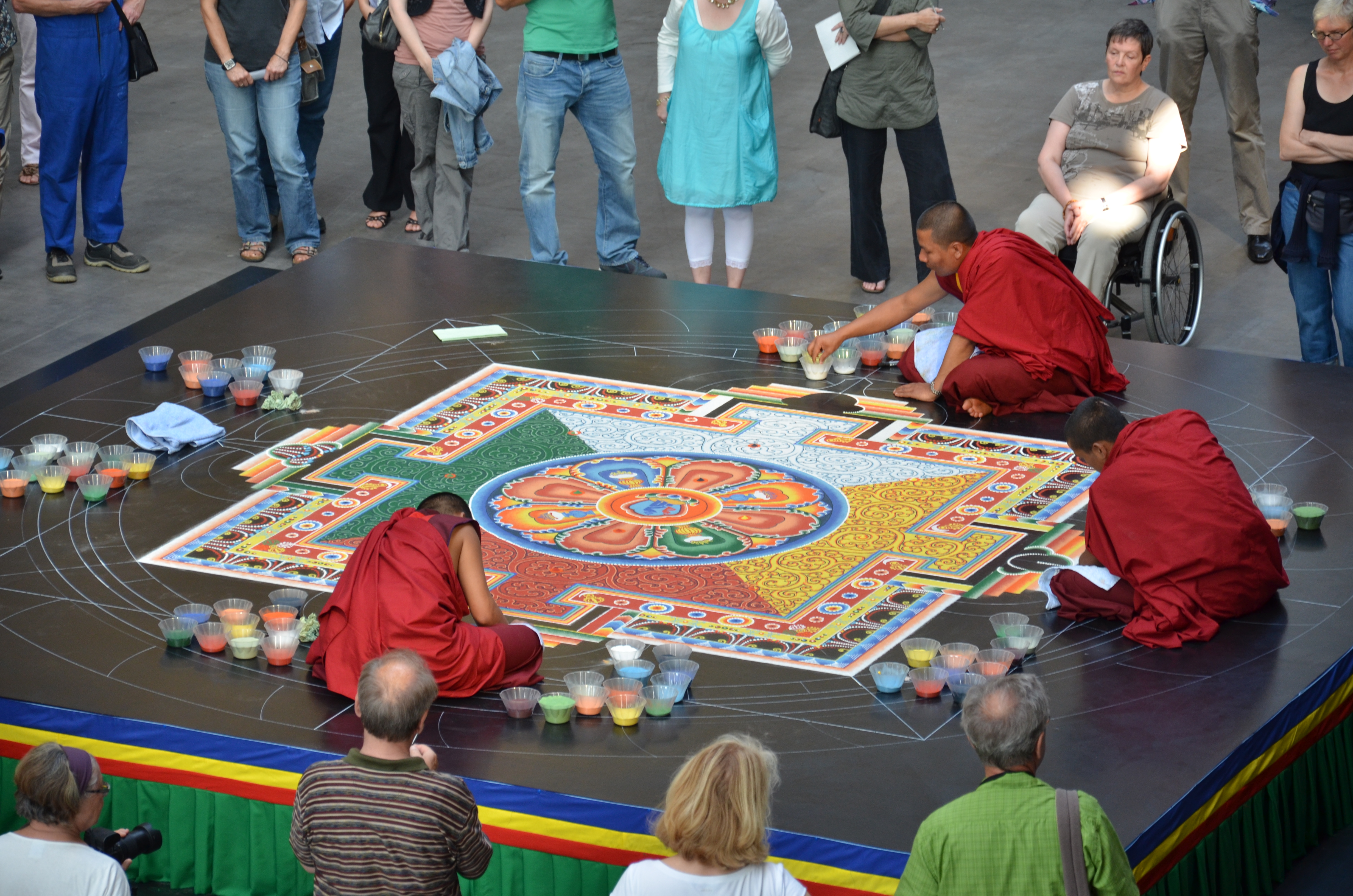 Zum Ende der Triennale in Bochum streuen sechs tibetisch-buddhistische Mönche aus Bhutan in der Jahrhunderthalle ein Chakrasamvara Sandmandala. Chakrasamvara bedeutet soviel wie "Die Gottheit des Rades der höchsten Glückseligkeit".